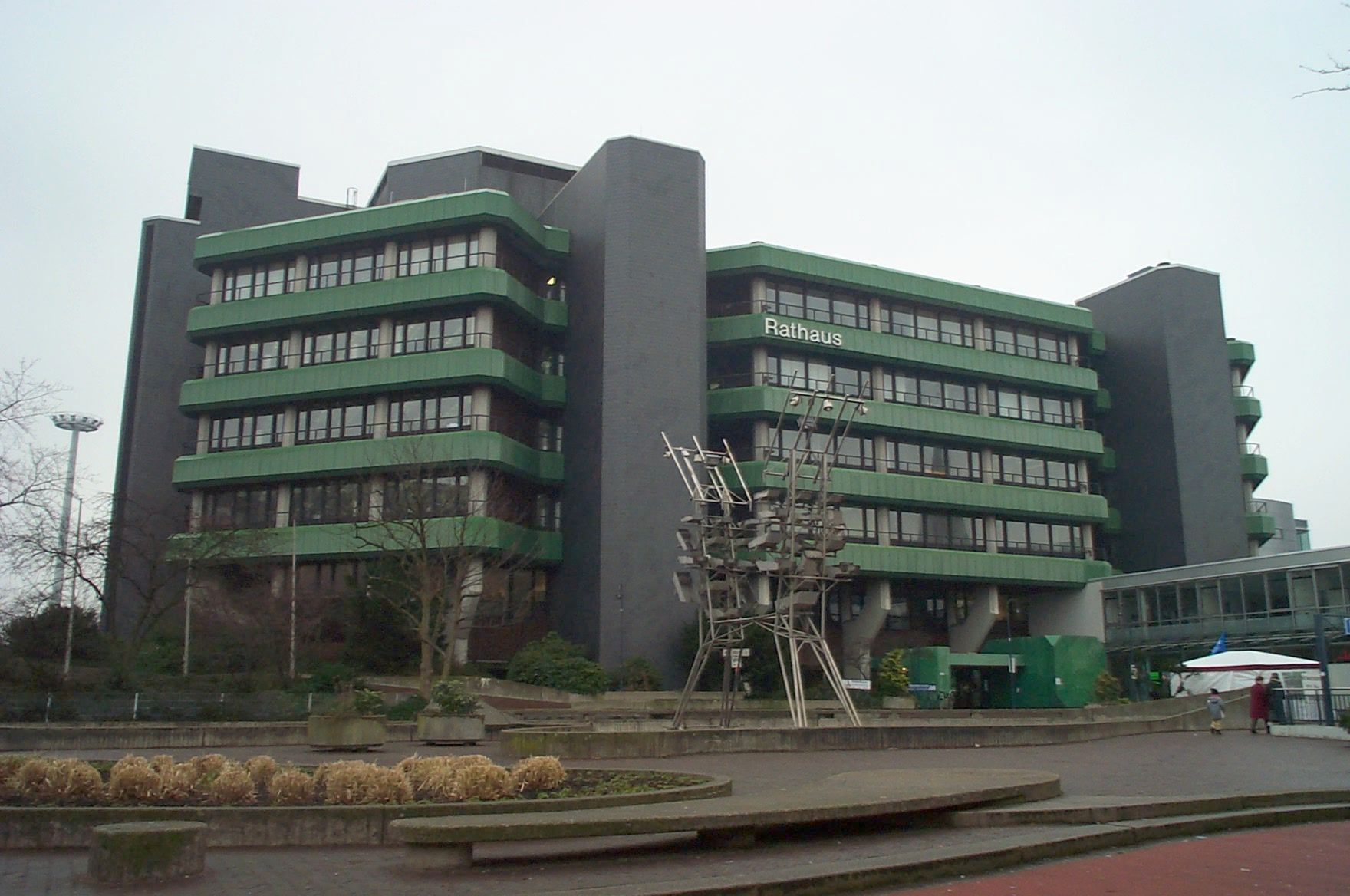 Ehemaliges Leverkusener Rathaus; davor befindet sich das "Aquamobil", eine Wasserplastik des Stuttgarter Künstlers Gottfried Gruner. Das Rathaus wurde Anfang 2008 abgerissen.